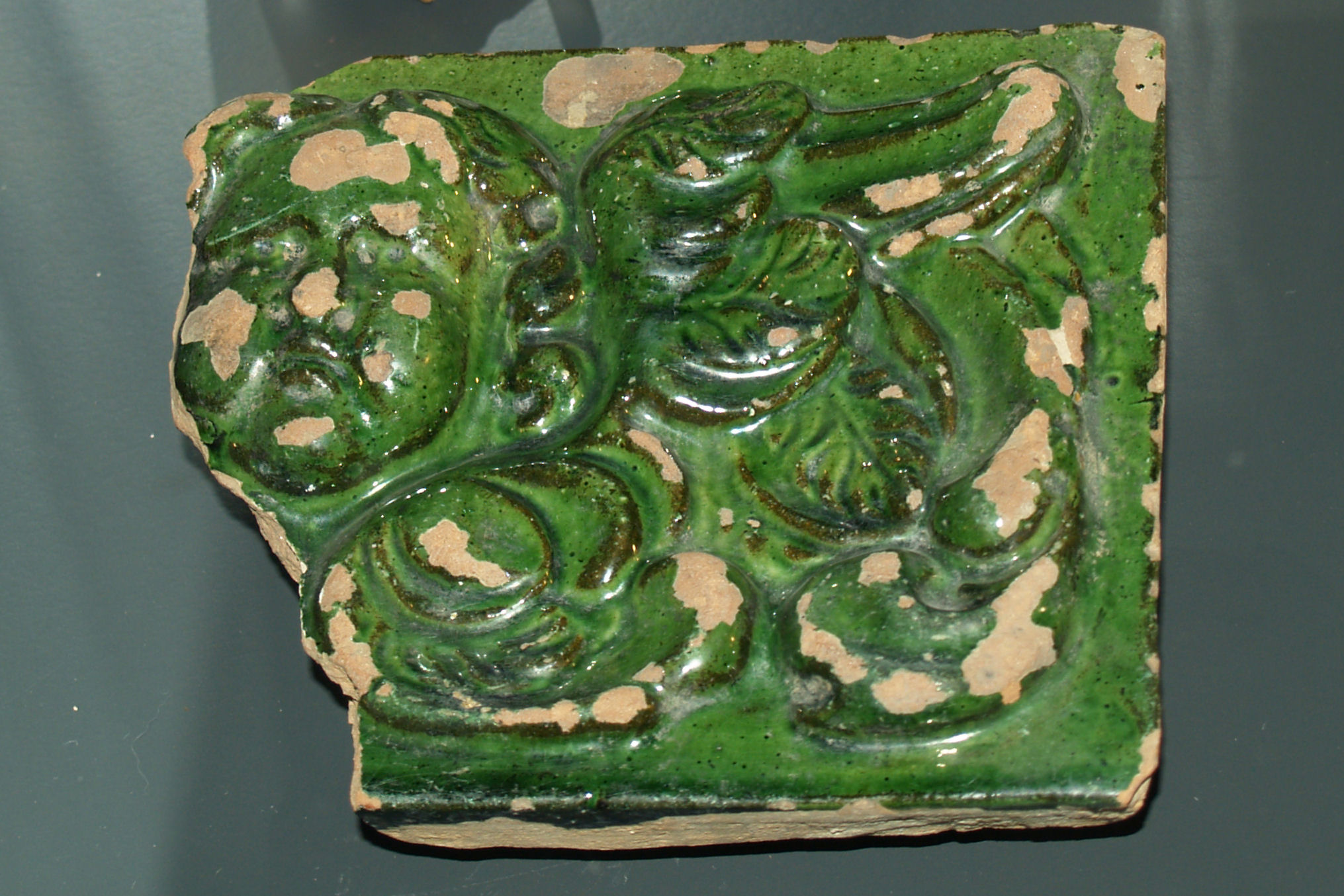 Fragmet einer Blattkachel aus fein gemagertem Ton; harter, roter Brand. Grüne Glasur, figürlicher Dekor. Zeitstellung: 2. Hälfte 17. Jahrhundert Fundort:Burg Habsburg, Abschnittsgraben (Grabung 1994)